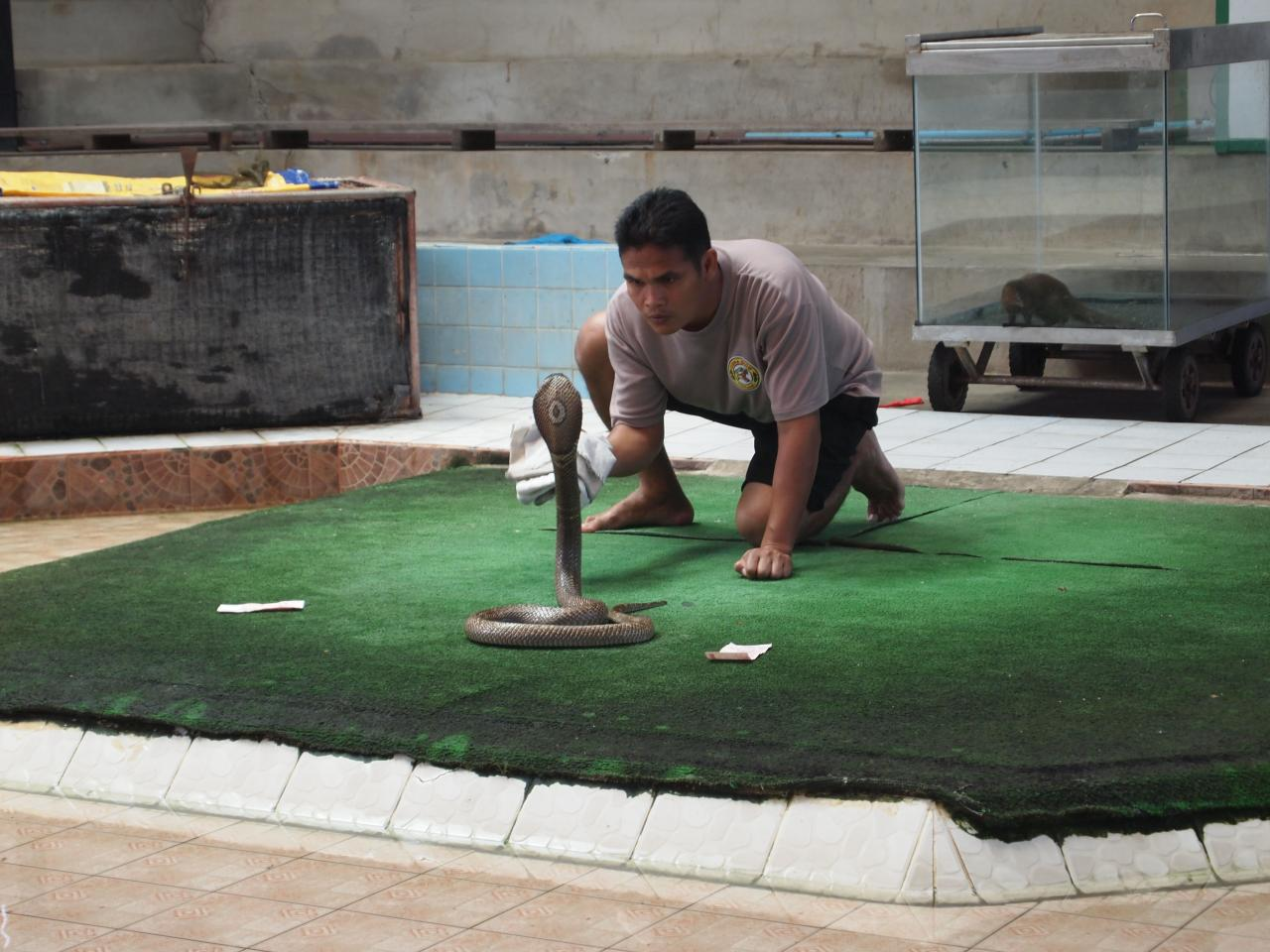 Thailand Cobra Show - Bangkok